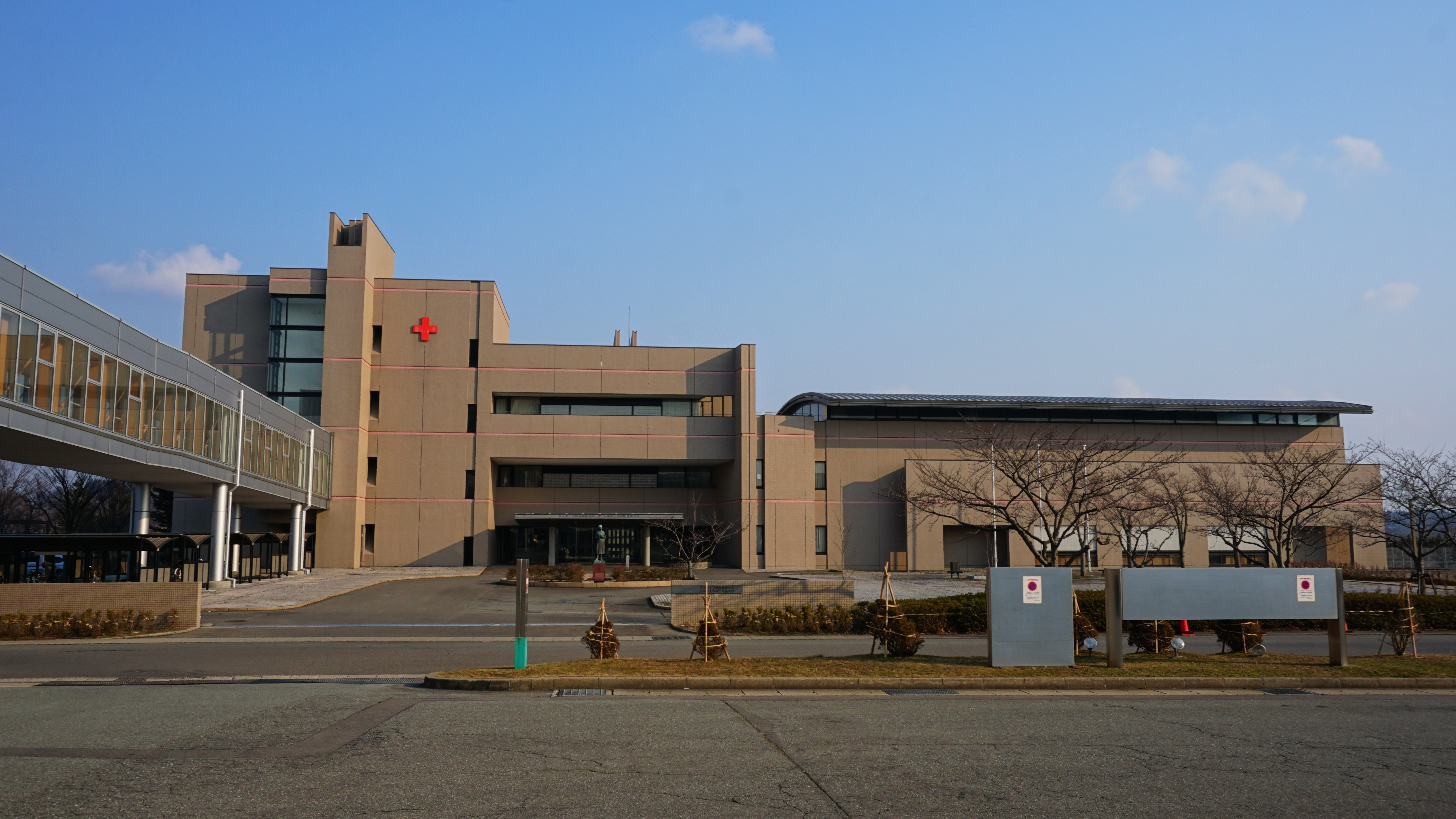 日本赤十字秋田看護大学・日本赤十字秋田短期大学